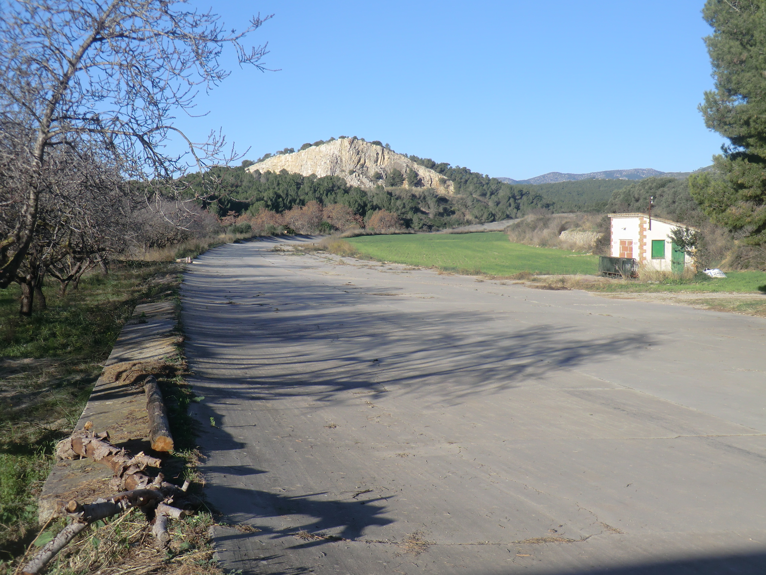 Recta de meta de l'autòdrom de Terramar (Sant Pere de Ribes) mirant cap a muntanya